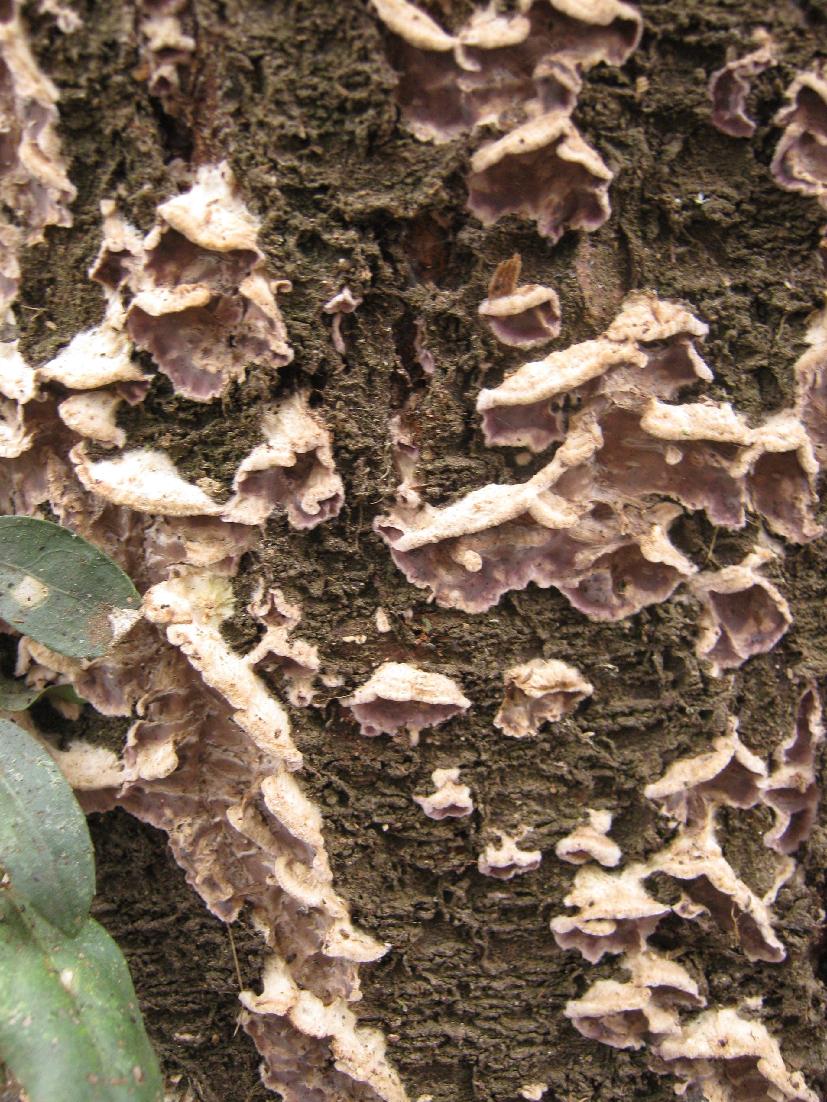 Cuerpo frutal de Chondrotereum purpureum en almendro, en huerto frutal cercano a Quillota, Chile.